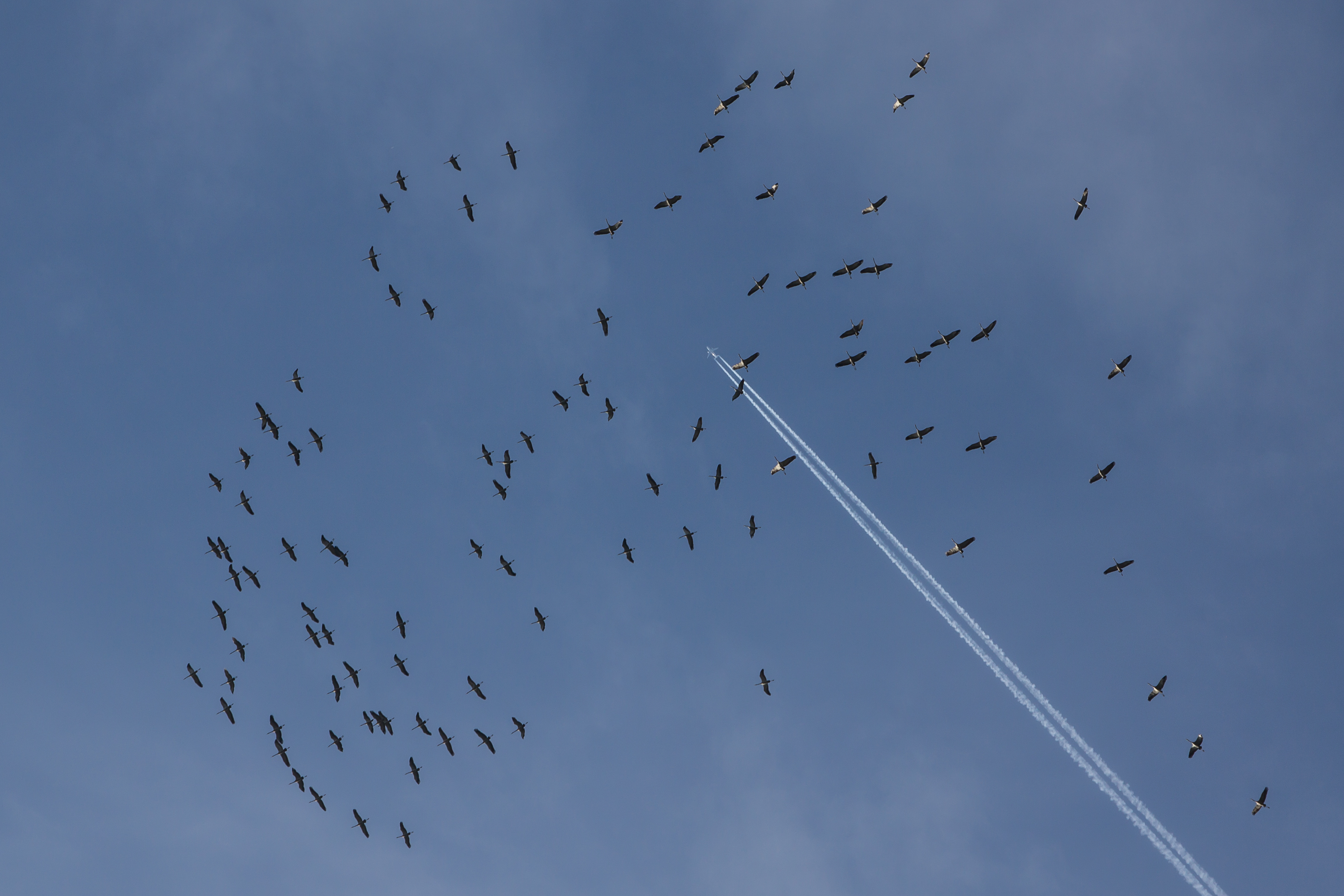 Kraniche nutzen eine Thermik zum Steigflug